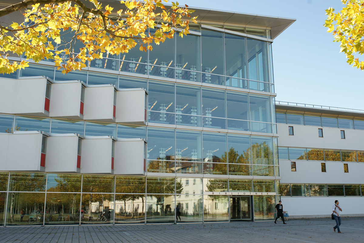 Universitäts- und Forschungsbibliothek Erfurt/Gotha